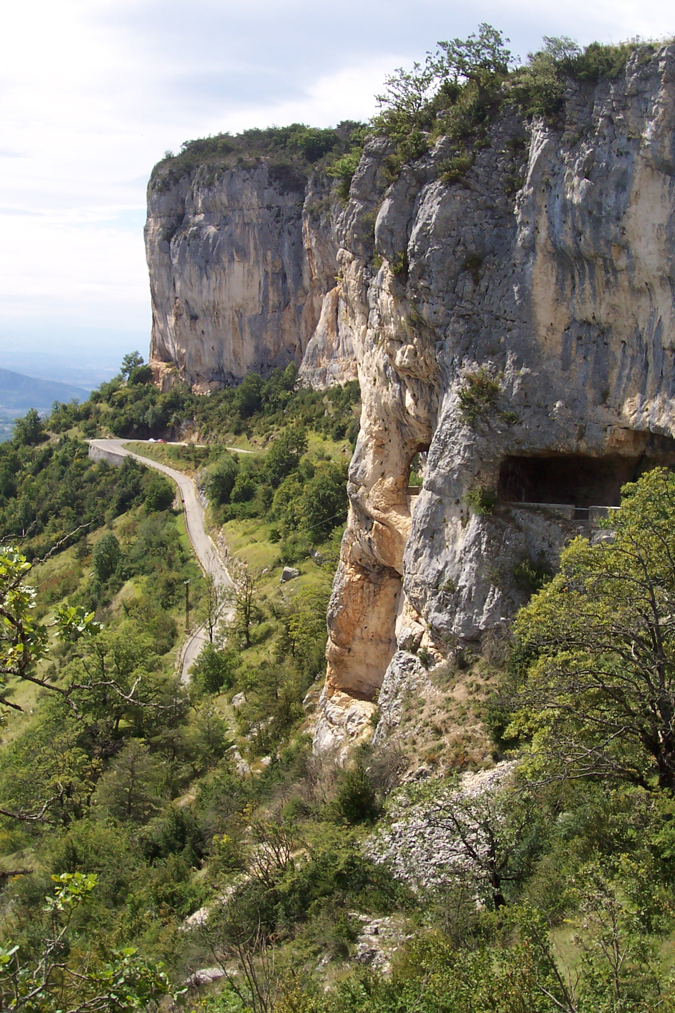 Falaise d'escalade de Presles (38)